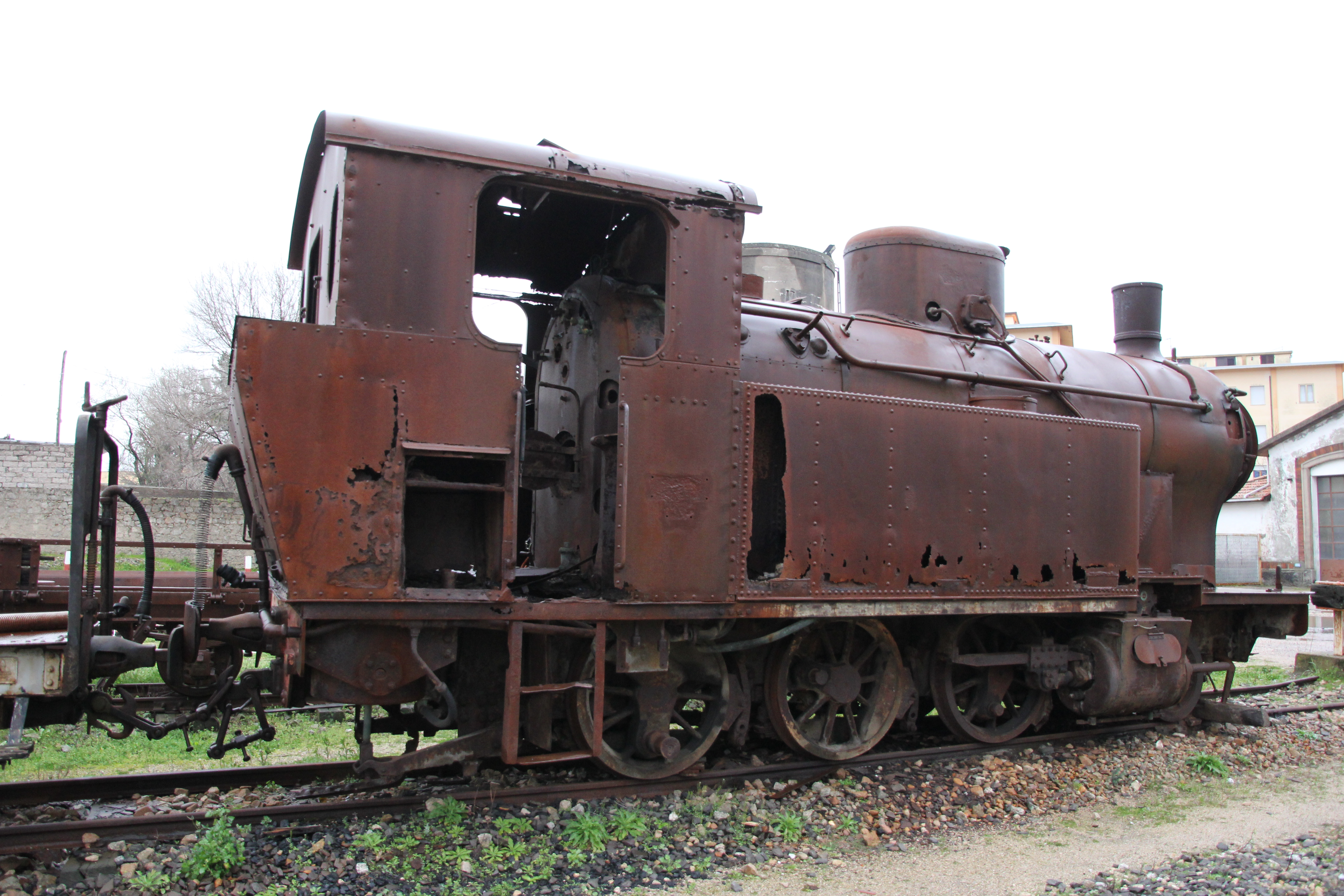 Tempio Pausania - Stazione ferroviaria